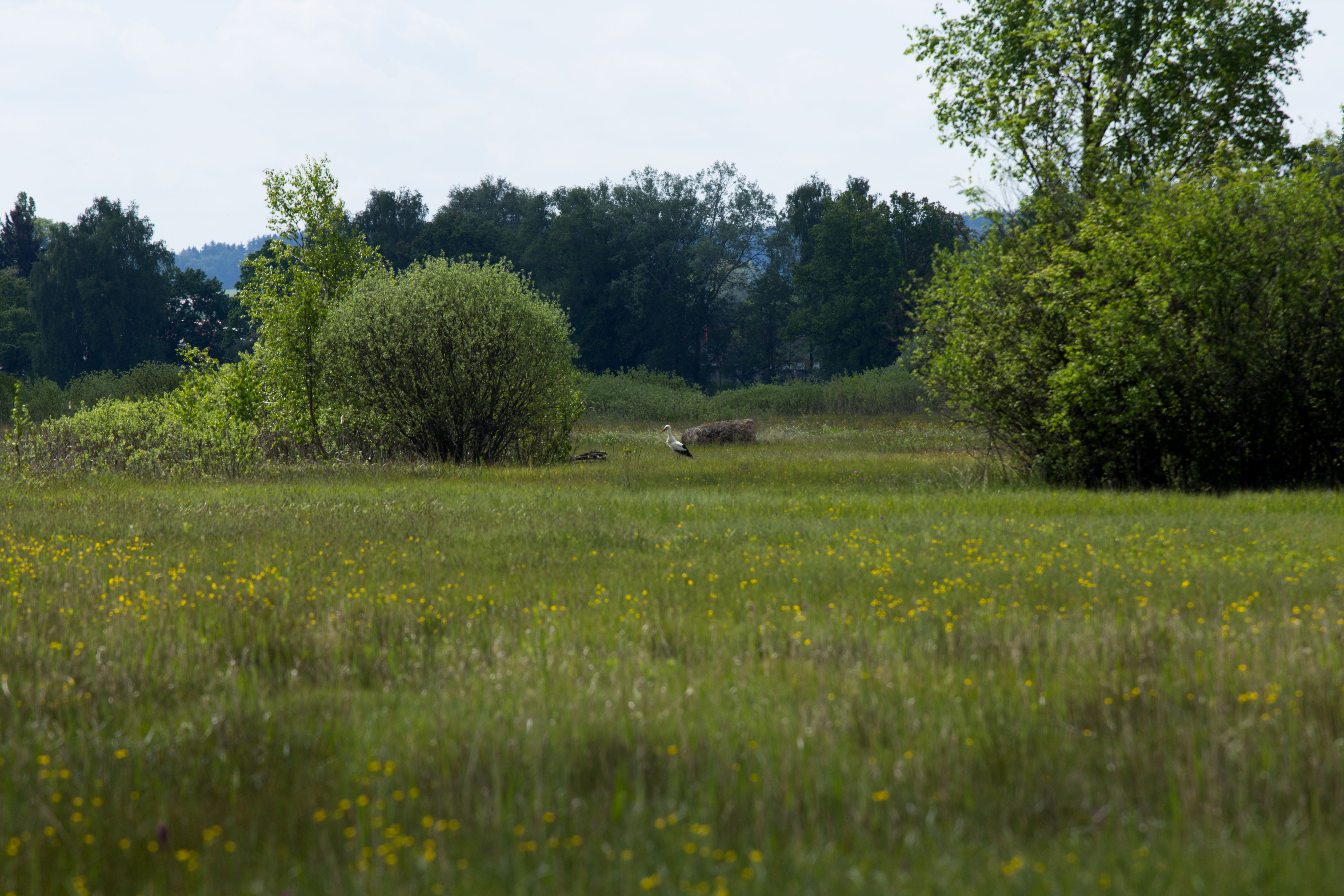 Der Weißstorch ist ein häufig zu beobachtender Vogel im NSG Pfaffenhauser Moos, da in den umliegenden Dörfern und Städten eine vielzahl an künstlichen Nistgelegenheiten zu finden ist.